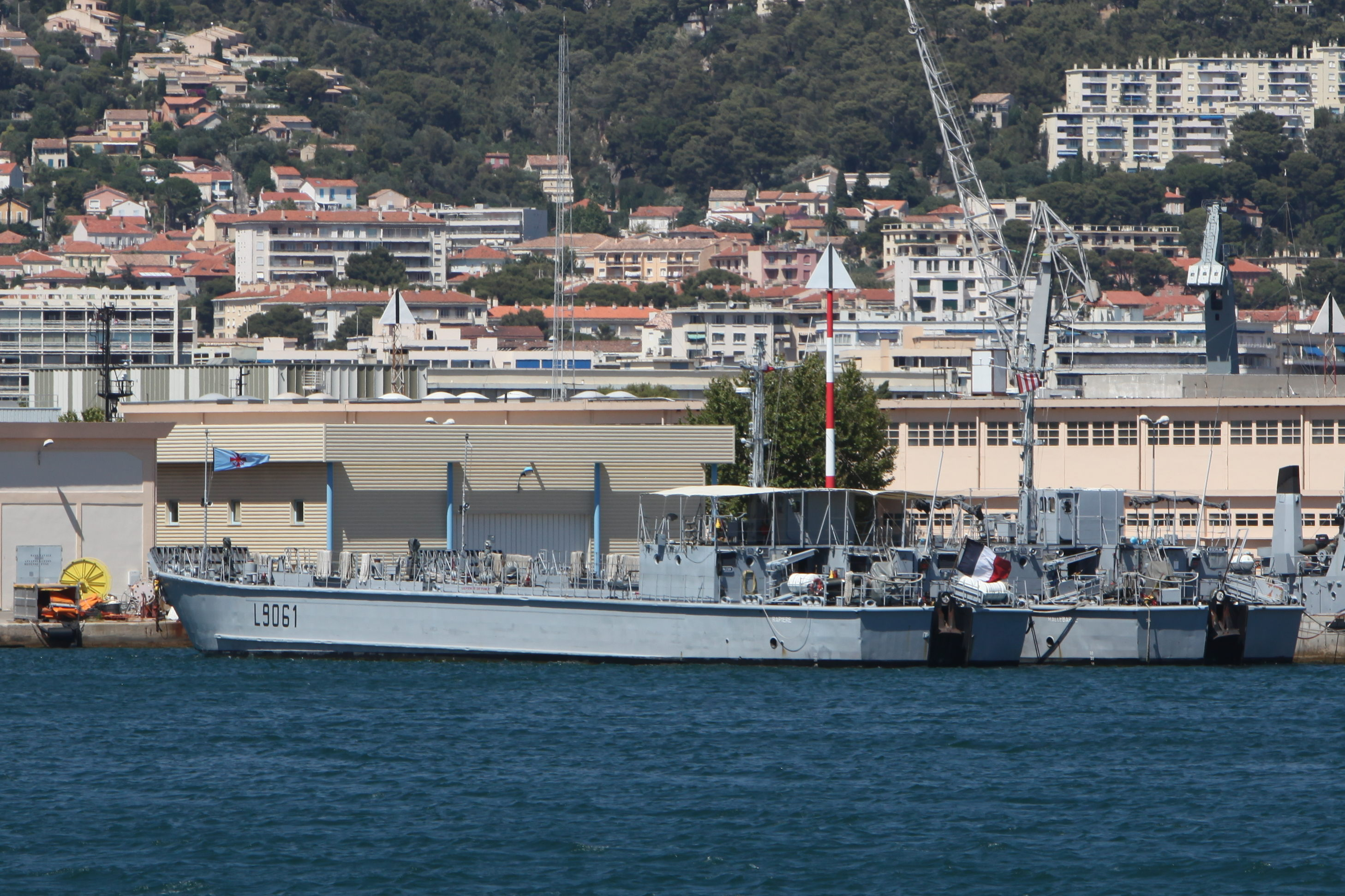 Chalands de débarquement d'infanterie et de chars in Toulon harbour, Rapière and Hallebarde.